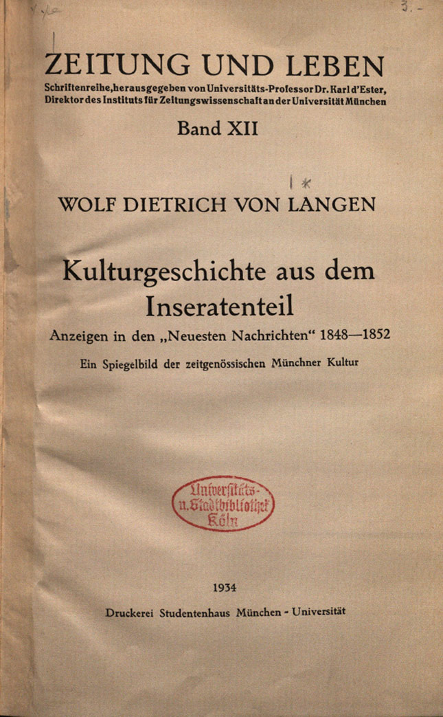 Deckblatt der Dissertation von Wolf Dietrich von Langen über die "Kulturgeschichte aus dem Inseratenteil. Anzeigen in den "Neuesten Nachrichten" 1848-1852